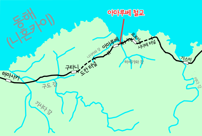 File:Amarube bridge map ja.png의 한국어 번역판